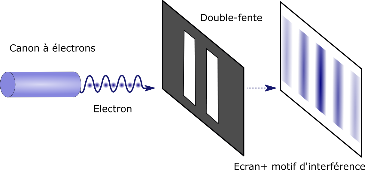 Schéma de l'experience des fentes d'Young